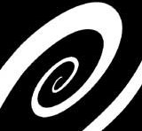 Logo: Open Society Institute